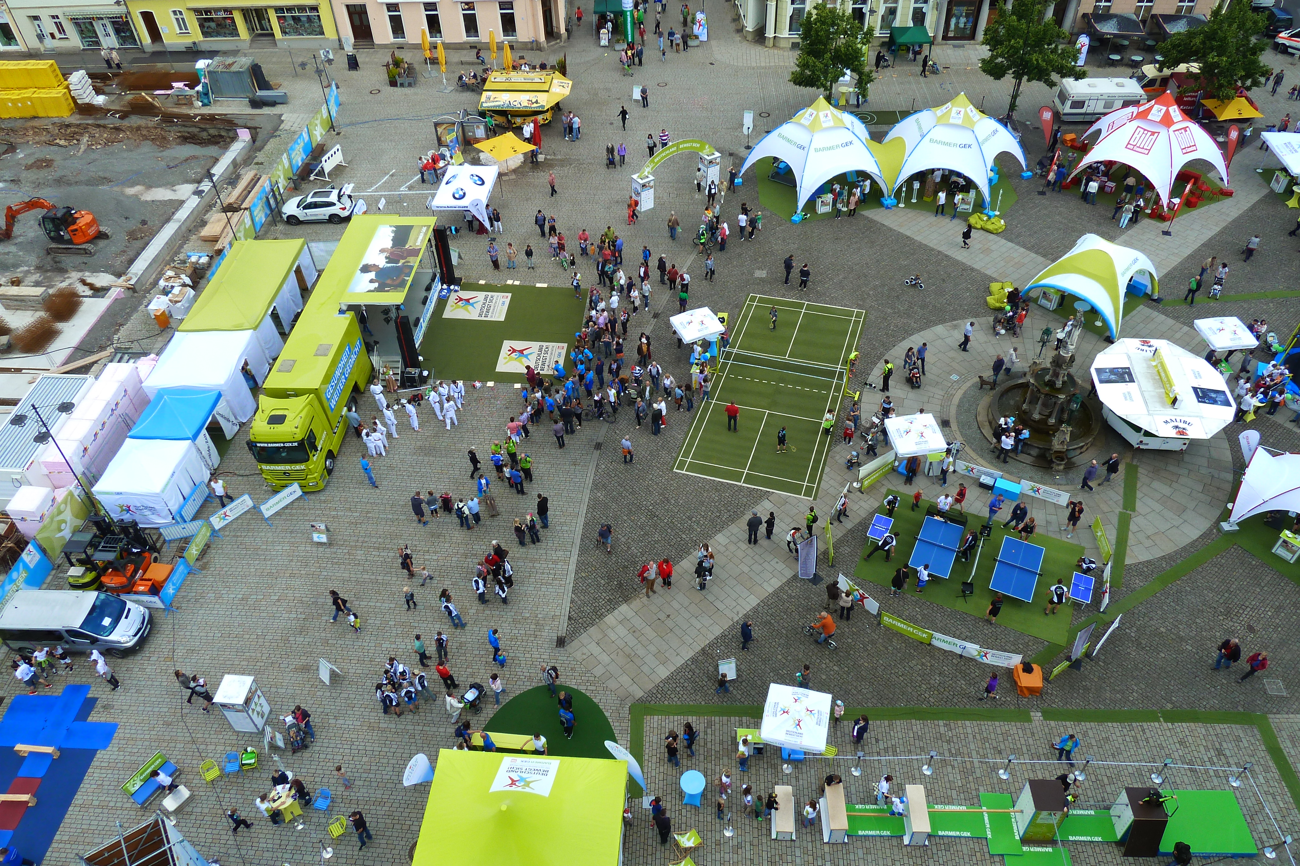 Breitensportveranstaltung "Deutschland bewegt sich" 2016 in Meiningen